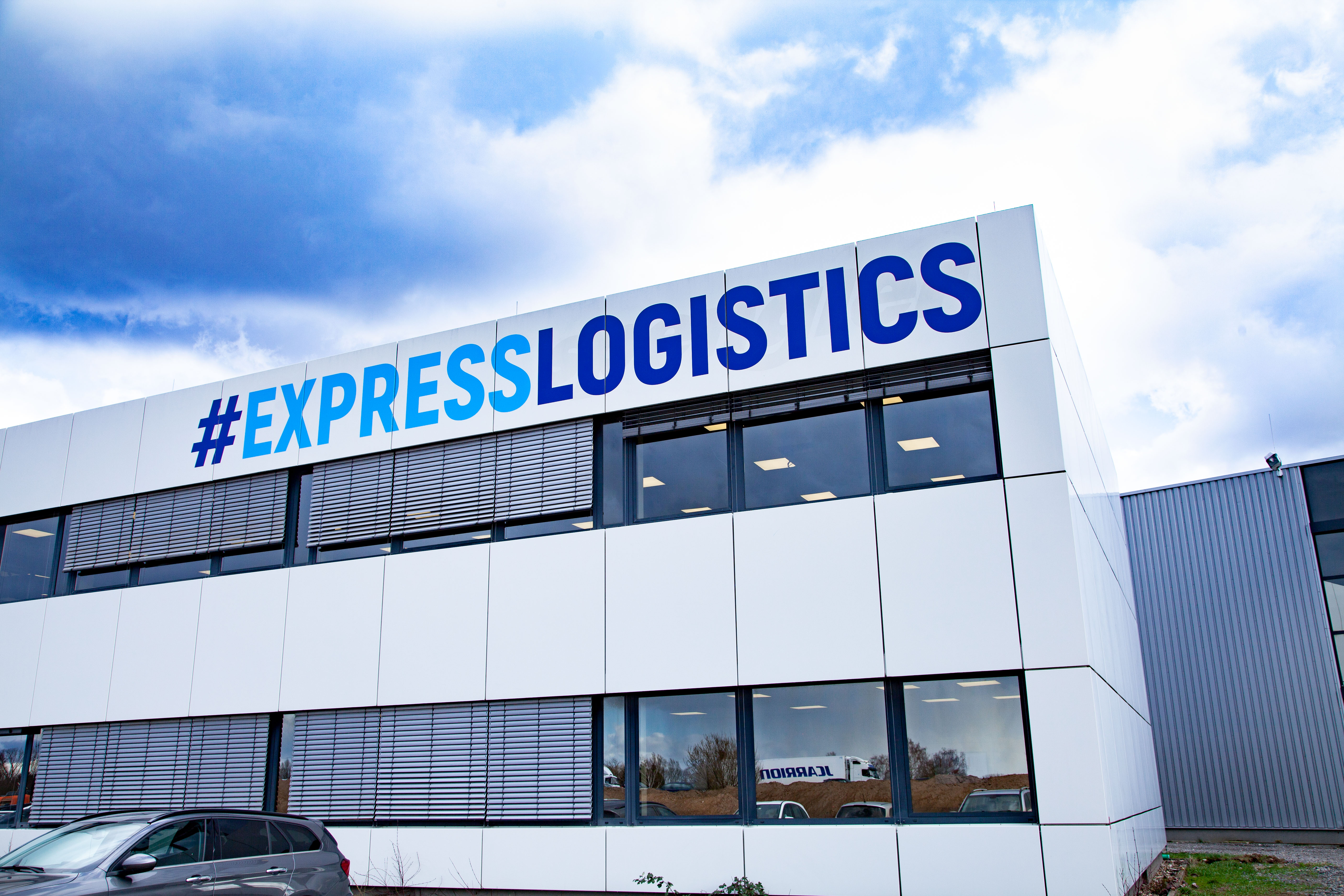 Hauptsitz der Hegelmann Group